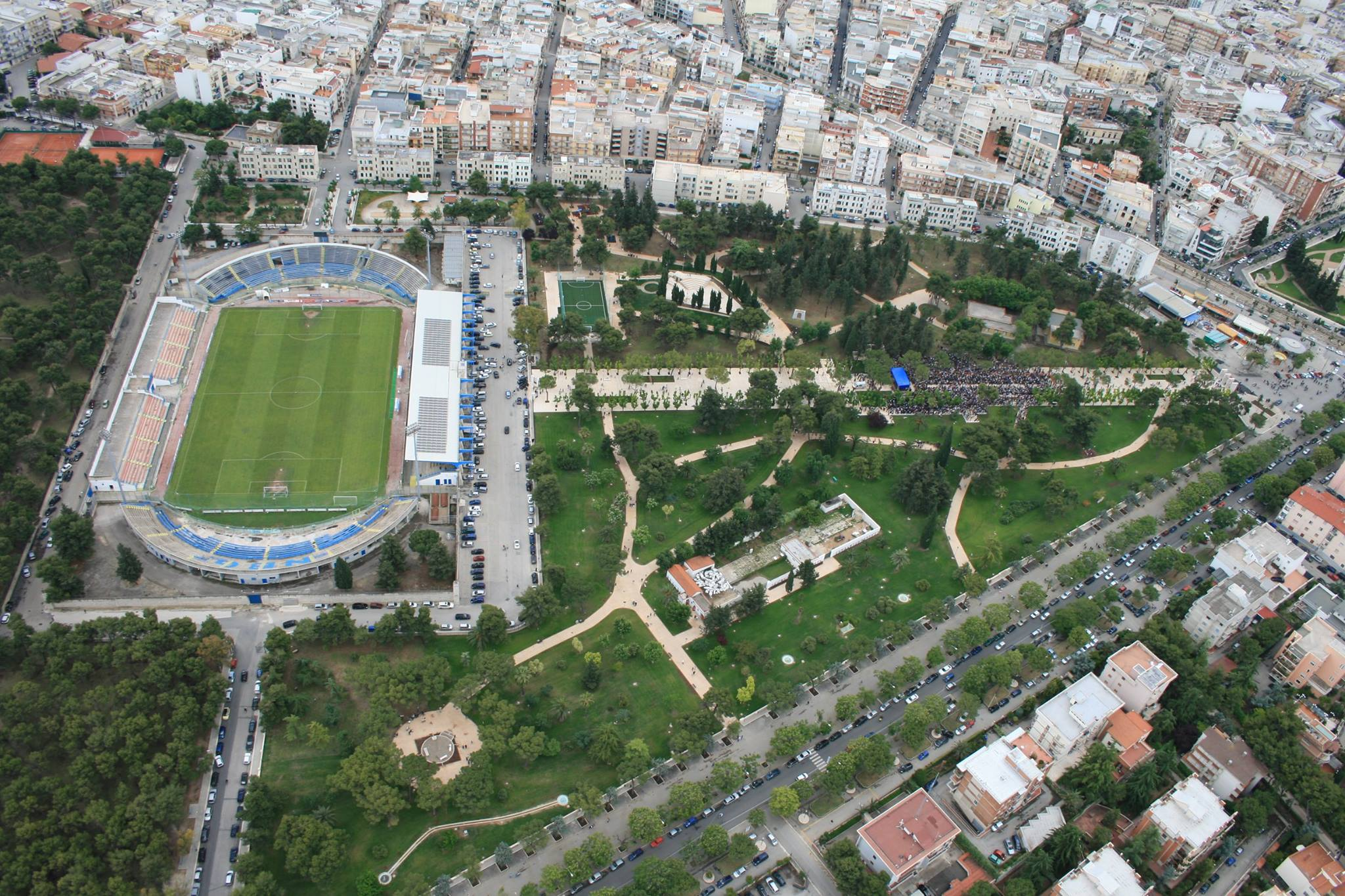 Inaugurazione Villa comunale "Giuseppe Marano" - Andria